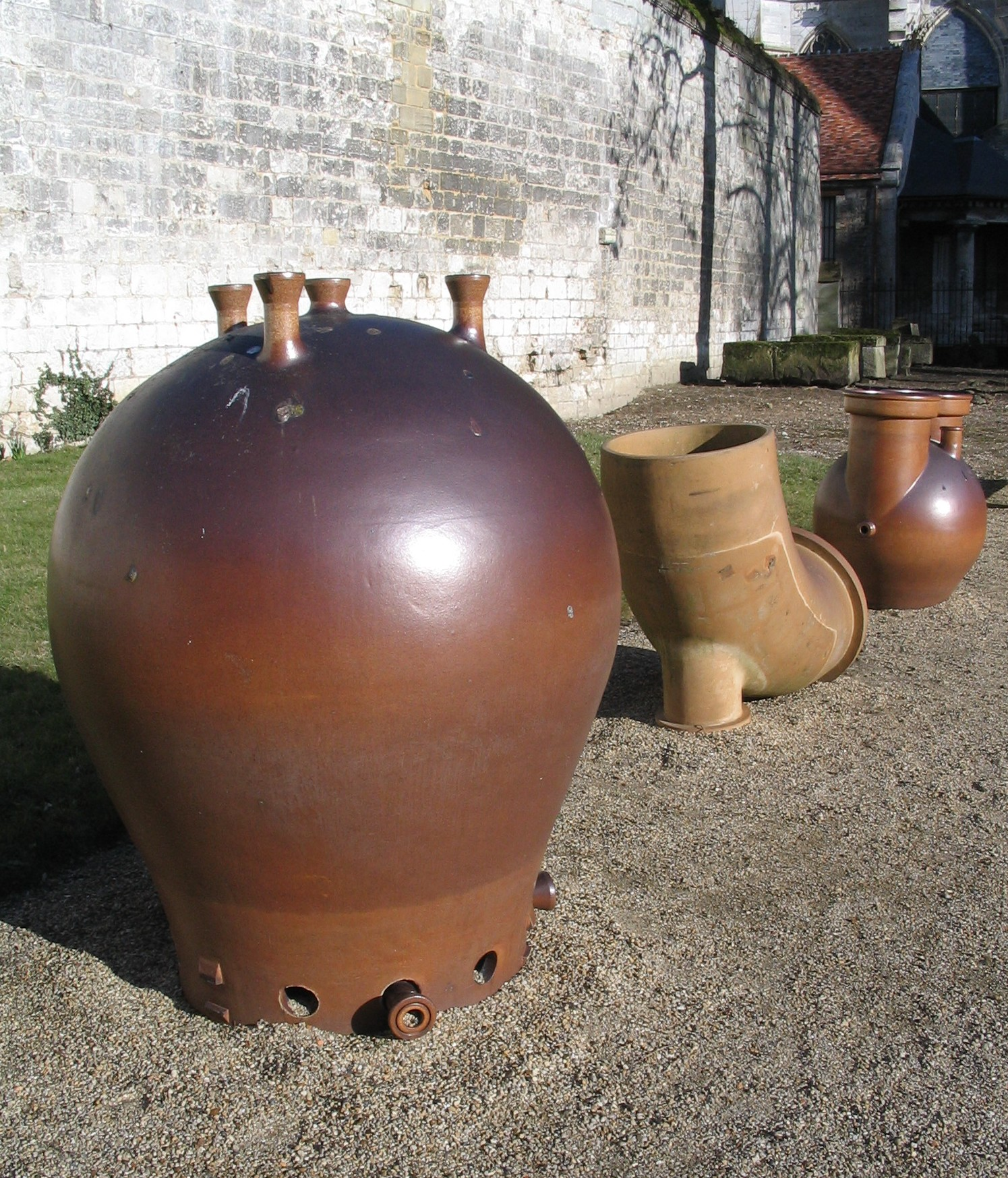 Pièces de grès à usage technique et chimique, Beauvais, France